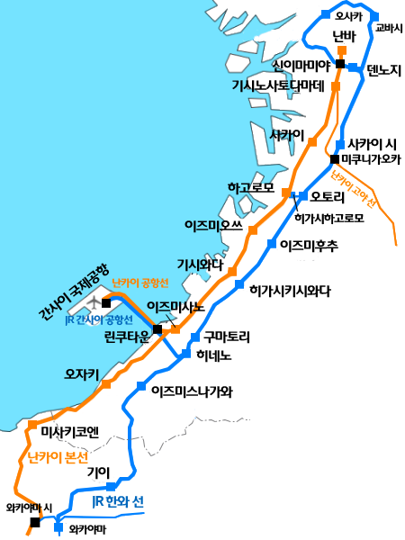 このファイルは大阪から和歌山までのＪＲ線と私鉄線(南海電気鉄道)が競合する区間の鉄道の路線図です。 なお、User:RailRiderさんが作ったファイルを韓国語(朝鮮語)で翻訳しました. :-)